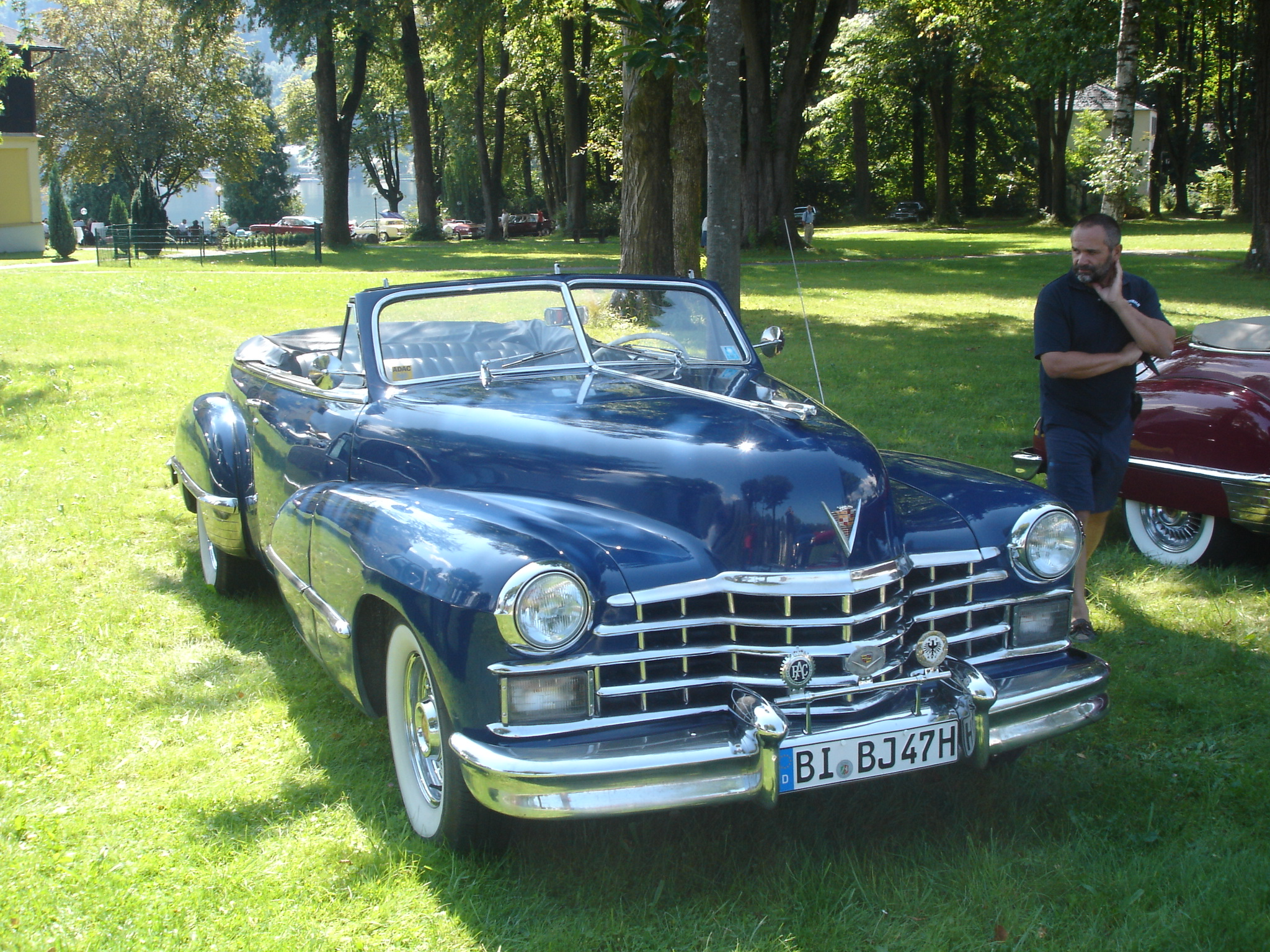 Cadillac Series 61 Cabri